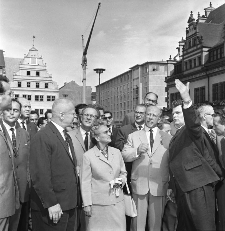 Leipzig, Besuch Walter Ulbricht Zentralbild/Junge 6.9.1964 Leipziger Herbstmesse 1964 Nach der Besichtigung einiger Messehäuser unternahm der Erste Sekretär des ZK der SED und Vorsitzende des Staatsrates, Walter Ulbricht am 6.9.1964 einen Rundgang durch die Innenstadt und informierte sich über den weiteren Aufbau der Messemetropole unserer Republik. UBz: Walter Ulbricht und seine Begleitung auf dem Leipziger Markt. Von links nach rechts.: der Oberbürgermeister der Messestadt, Walter Kresse; das Mitglied des Politbüros des ZK der SED, Erich Honecker, die Gattin des Vorsitzenden des Staatsrates, Lotte Ulbricht; das Mitglied des Politbüros und 1. Sekretär der SED-Bezirksleitung Berlin, Paul Verner; Walter Ulbricht und der Kandidat des Politbüros des ZK der SED und 1. Sekretär der SED-Bezirksleitung Leipzig, Paul Fröhlich. Abgebildete Personen: Ulbricht, Walter: Staatsratsvorsitzender, Erster Sekretär des Zentralkomitees (ZK) der SED, Vorsitzender des Nationalen Verteidigungsrate, DDR (GND 118625179) Ulbricht, Lotte: Frauenkommission beim Politbüro der SED, wissenschaftliche Mitarbeiterin im Institut für Marxismus-Leninismus beim Zentralkomitee (ZK) der SED, DDR (GND 124576559) Kresse, Walter: Präsident des Städte- und Gemeindetages, DDR (GND 1122045786) Verner, Paul: Vorsitzender des Staatsrates, Sekretär des Zentralkomitees der SED, Präsident des Nationalrates der Nationalen Front, DDR (GND 118626639) Honecker, Erich: Staatsratsvorsitzender, Generalsekretär des ZK der SED, DDR (GND 118553399) Fröhlich, Paul: Politbüro des ZK der SED, Sekretär der SED-Bezirksleitung Leipzig, DDR (GND 131719084)